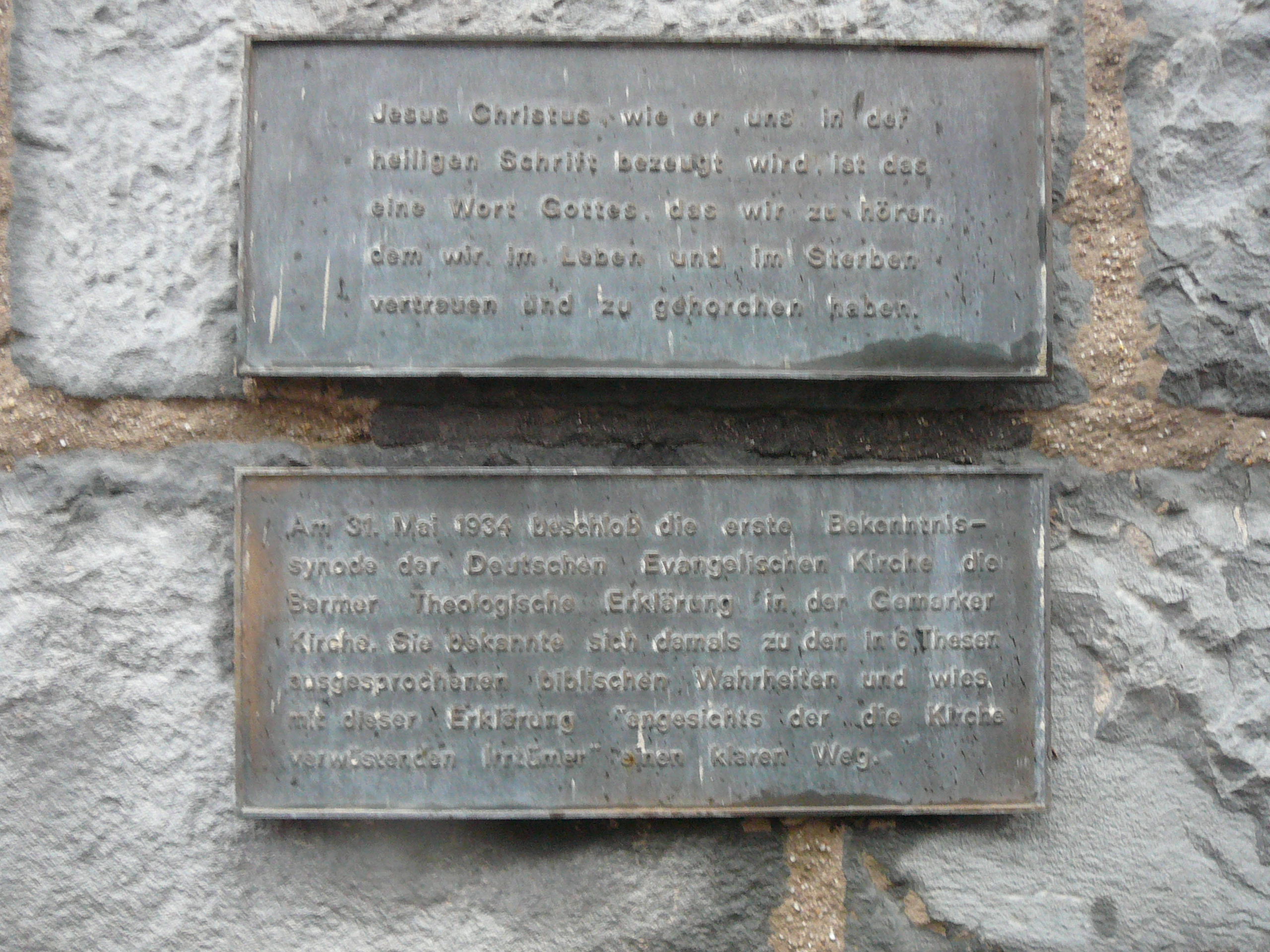 Zwinglistraße, Wuppertal